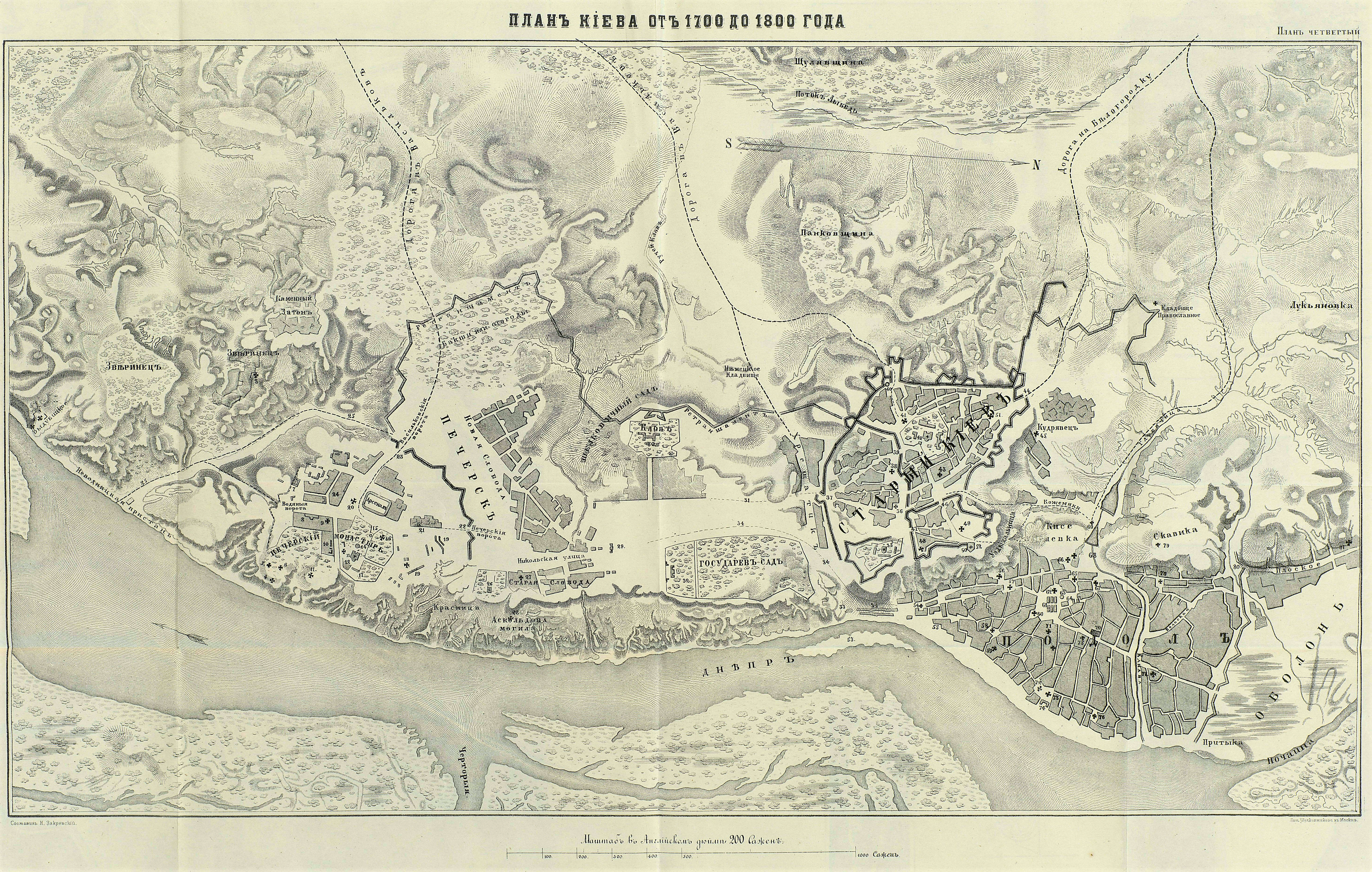 План Киева от 1700 до 1800 года. Закревский Н.В. "Описание Киева." - Москва, 1868. Т.2.